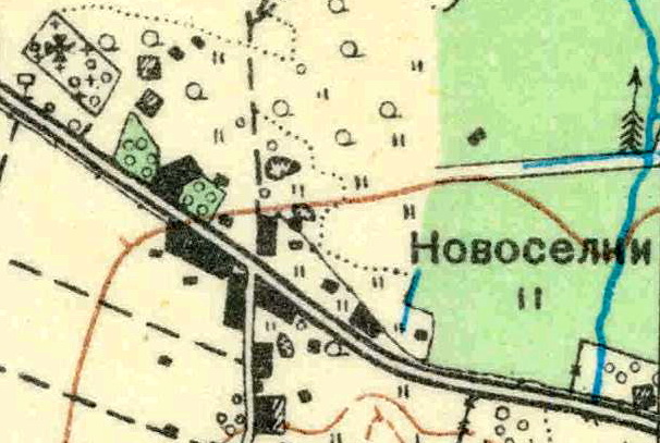 Топографическая карта Ленинградской области, квадрат О-35-11-В-в (Копорье), деревня Новосёлки